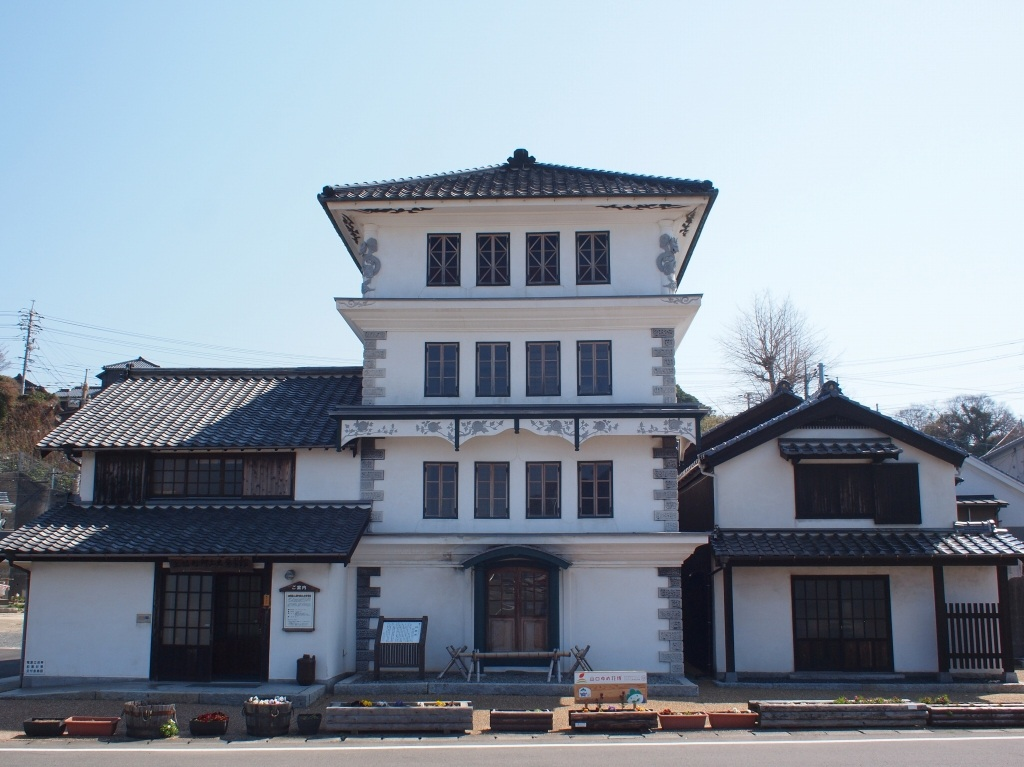 四階楼 外観